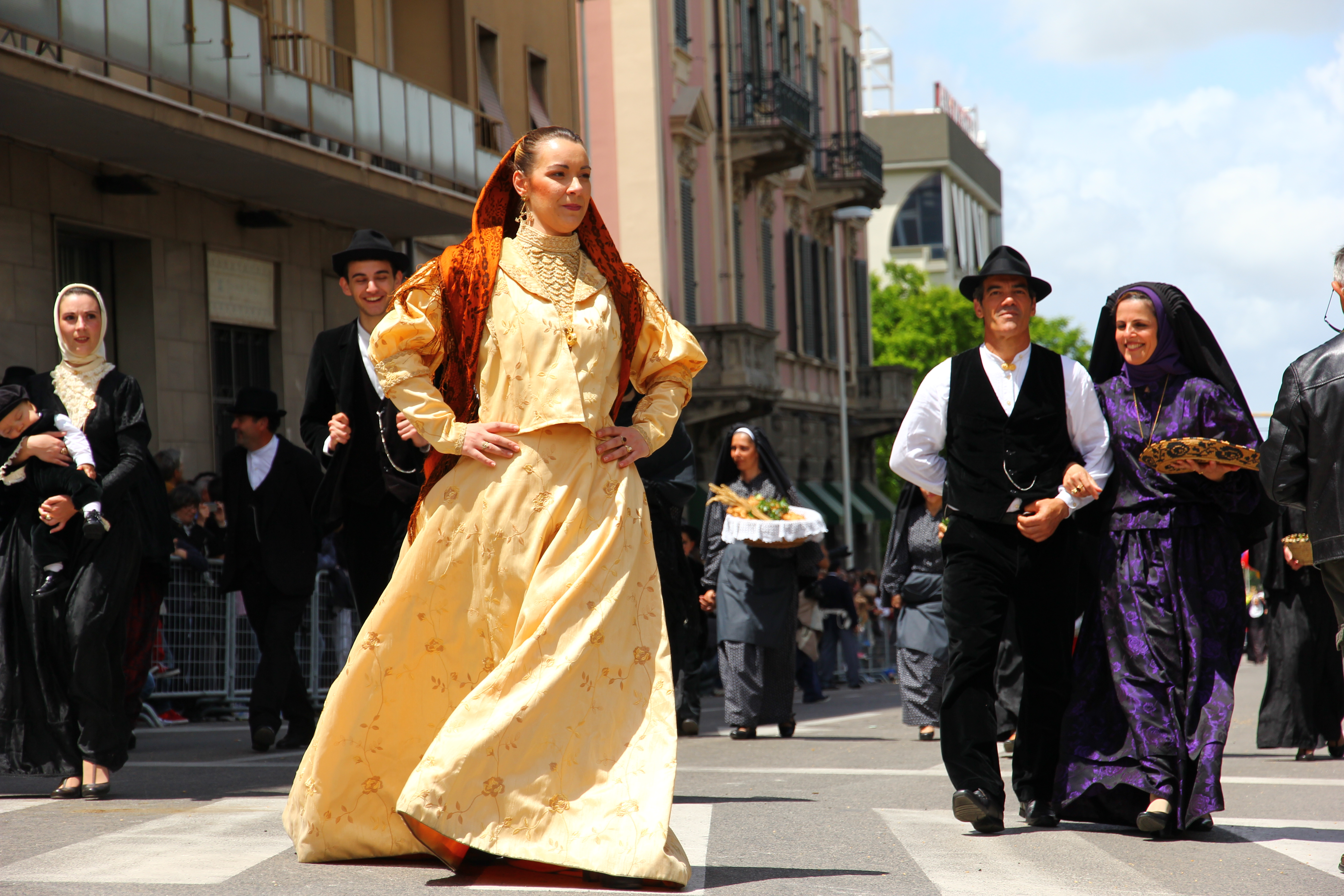 Cavalcata Sarda 2013 (Sassari)